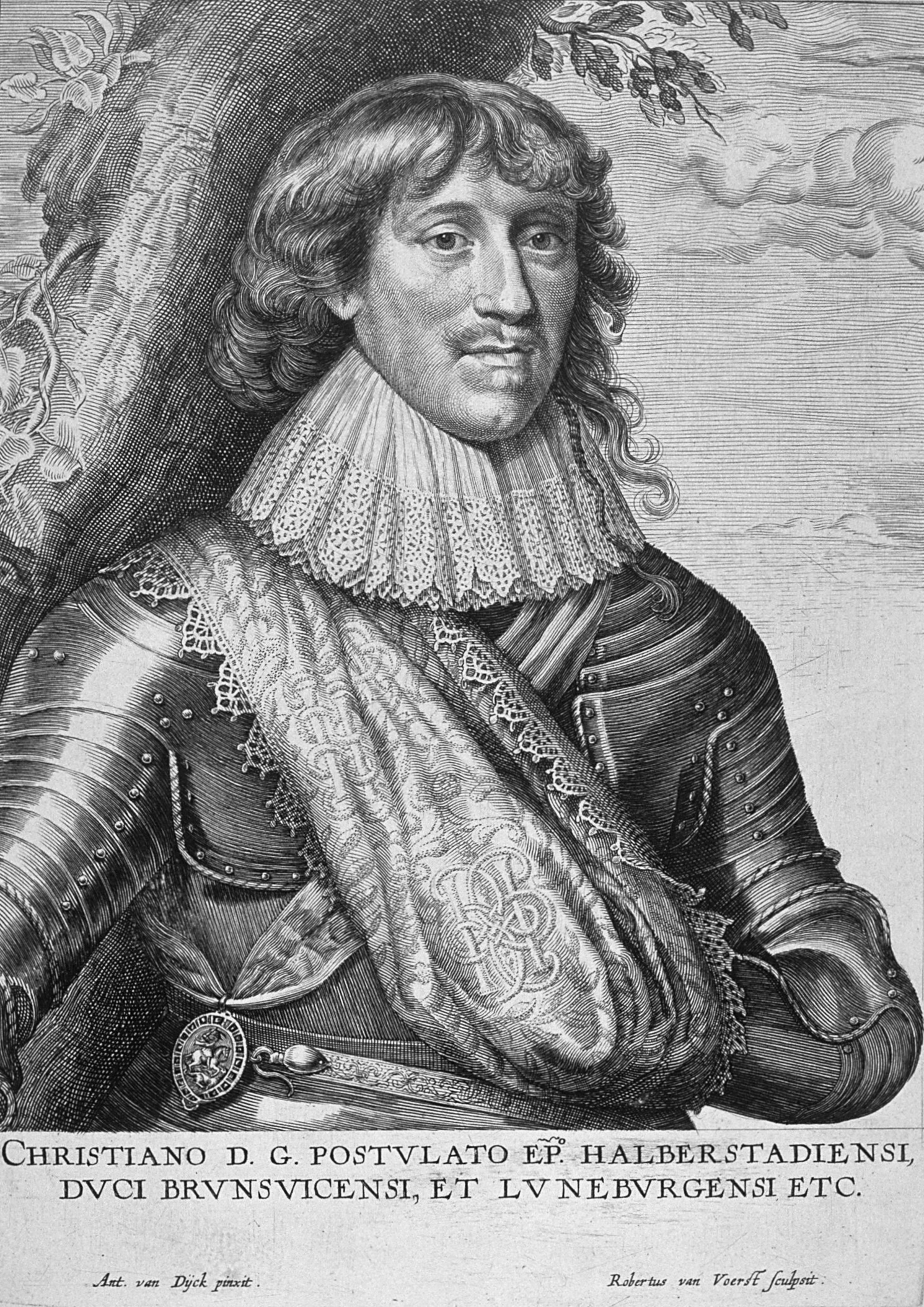 Christian von Braunschweig-Wolfenbüttel